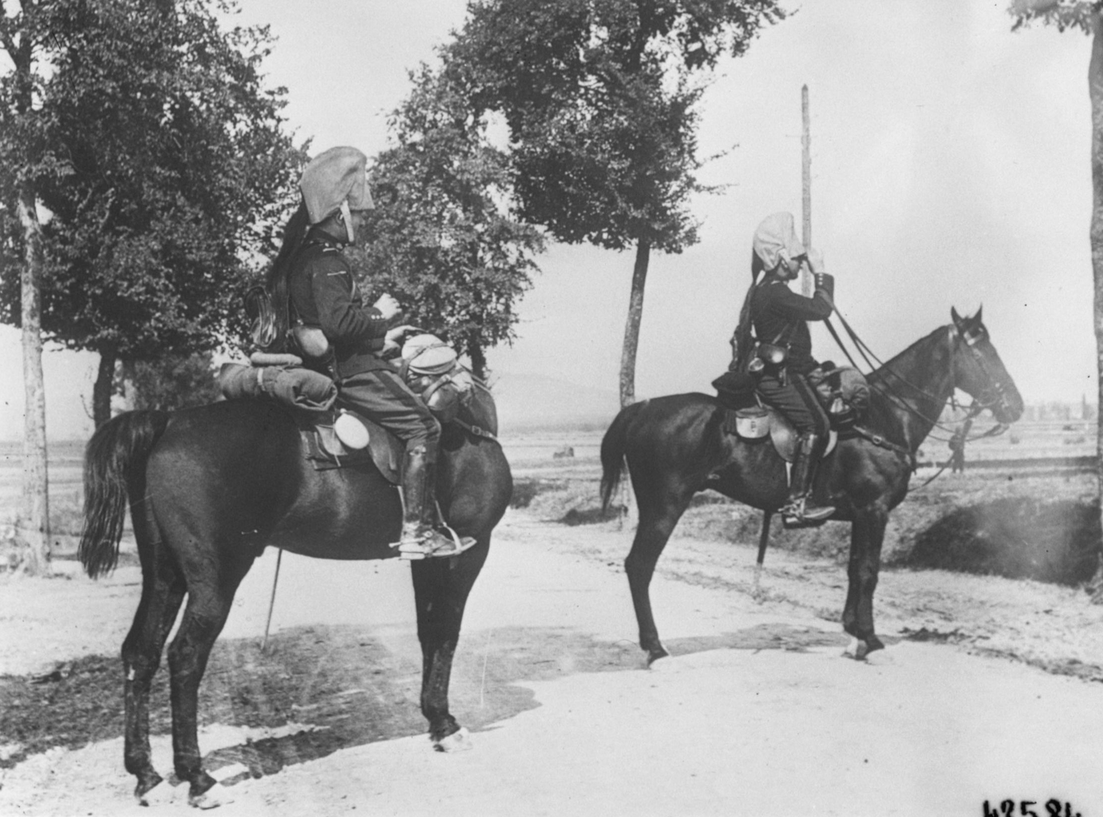 Cavaliers français d'une régiment de dragons en reconnaissance.